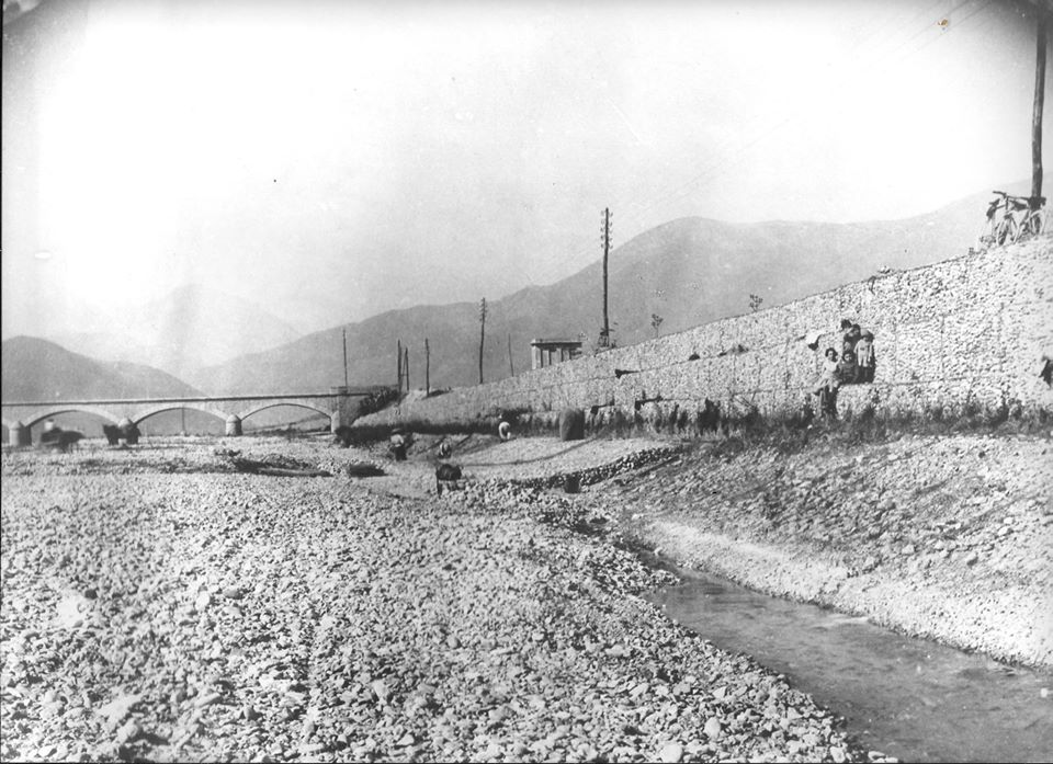 Argini del Centa a Bastia sul Neva